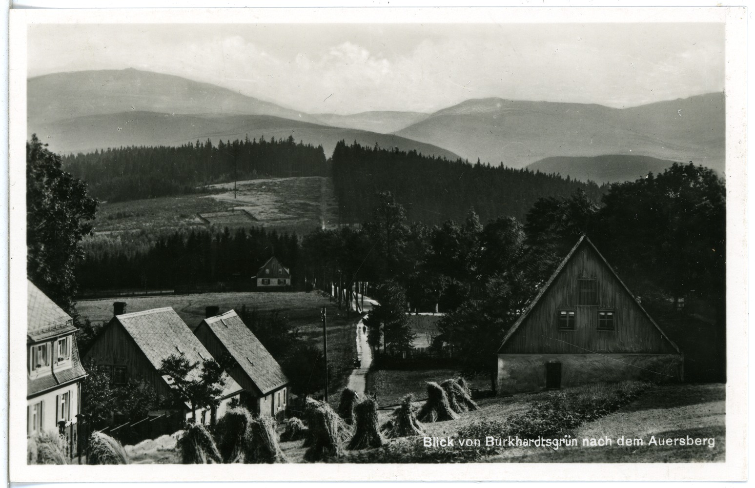 Burkhardtsgrün; Blick von Burkhardtsgrün zum Auersberg This postcard is from publisher Brück & Sohn in Meißen ( postcard has a unique number 25650 and is available in a higher resolution at the publisher. This images was uploaded in a cooperation project between Wikipedians and the publisher.